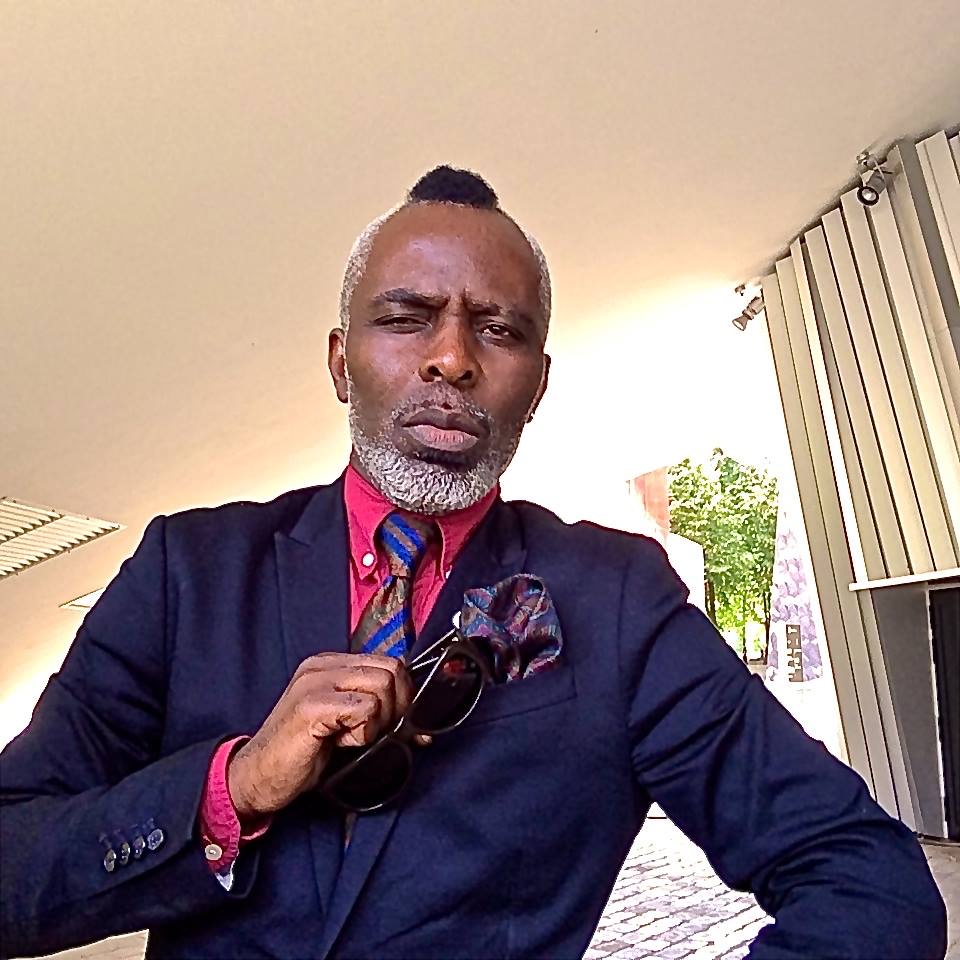 Un style classique, détaché